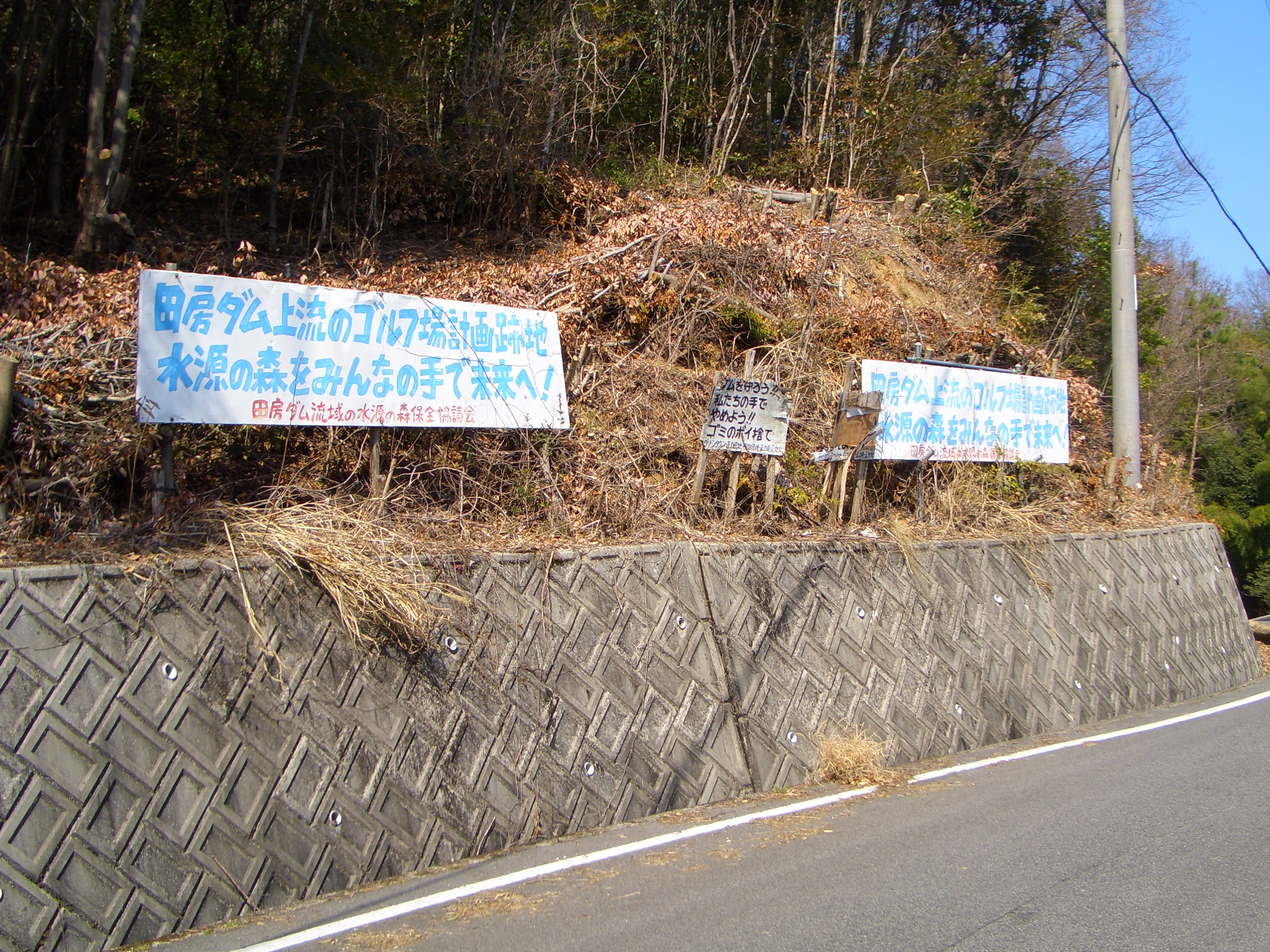 田房ダム付近の看板